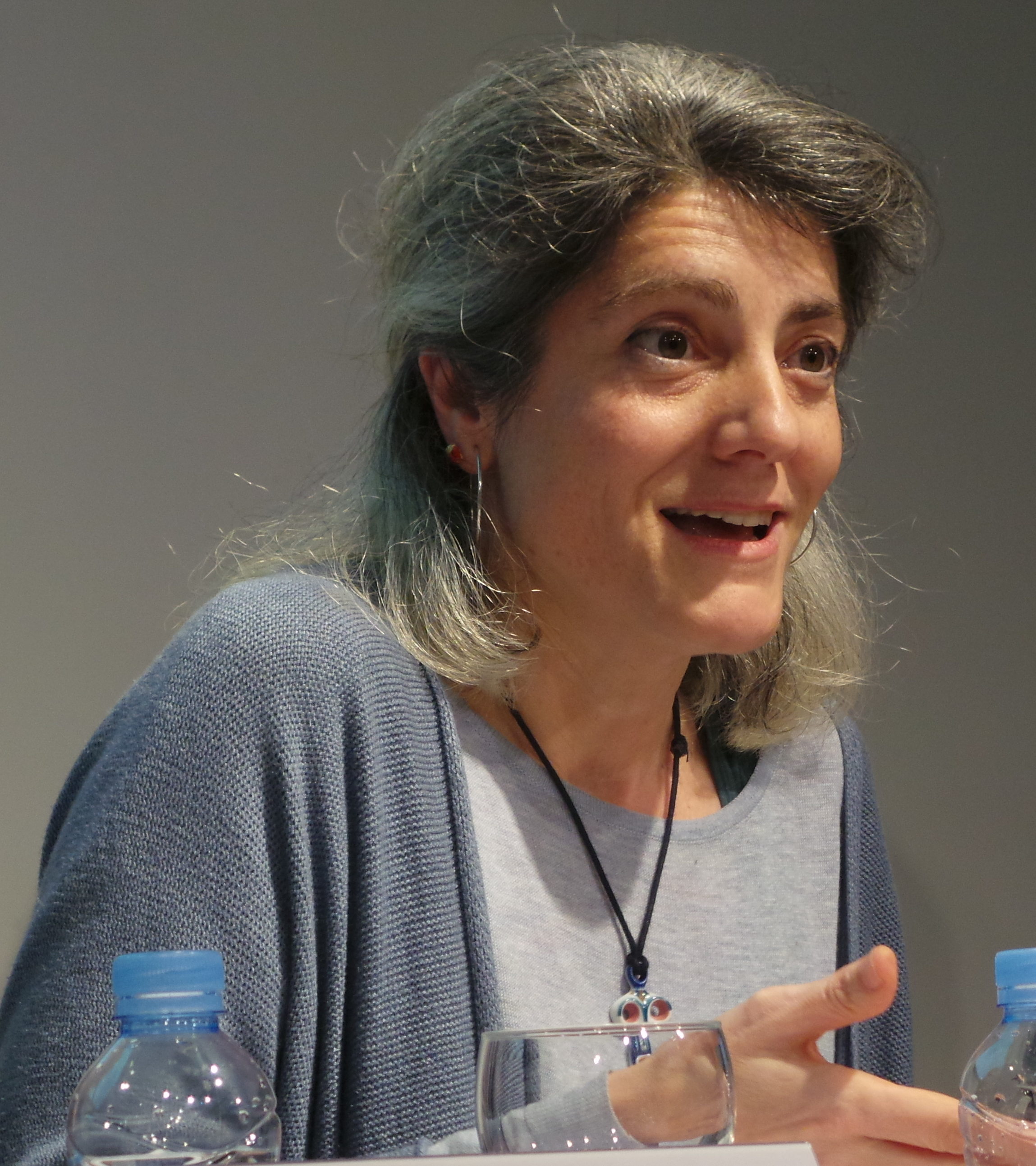 Taula rodona "On són les dones"